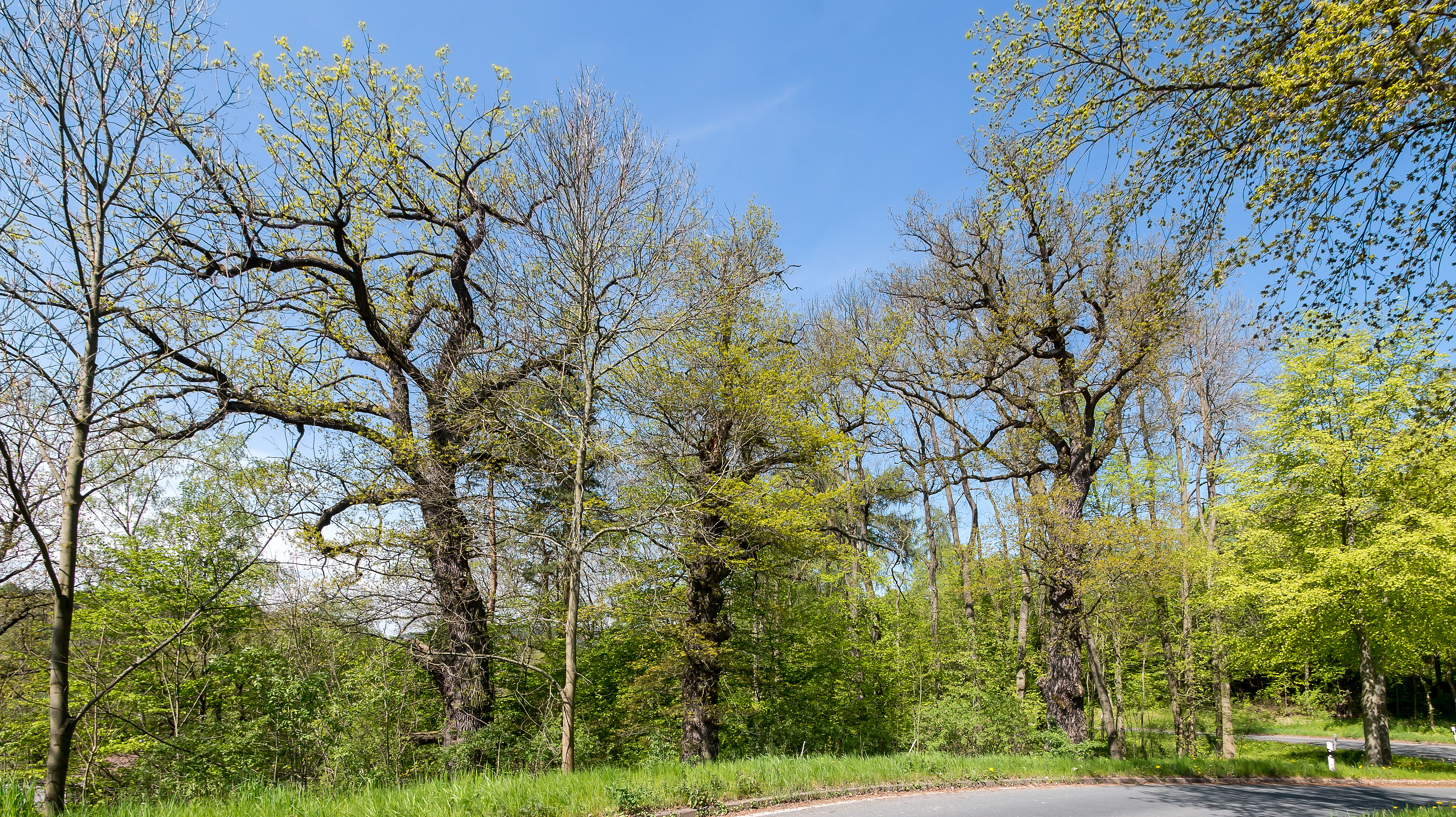 Alte Eichen Listen Nr. 15 Clöswitz V